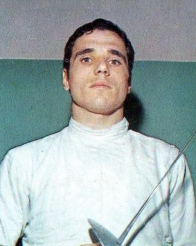 CAMPIONI dello SPORT 1968/69-n.332- RIGOLI - SCHERMA (ITA)-Rec